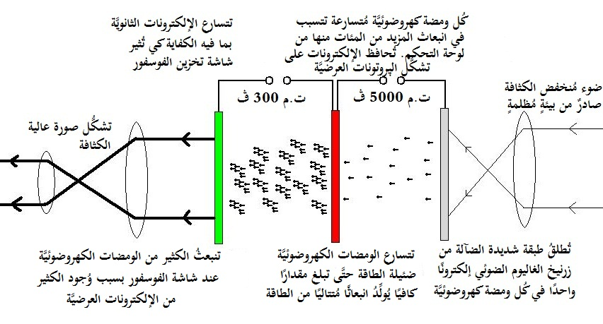 رسمٌ بيانيٌّ يُوضِّح كيفيَّة عمل مُضخِّم الموجات الكهروضوئيَّة.